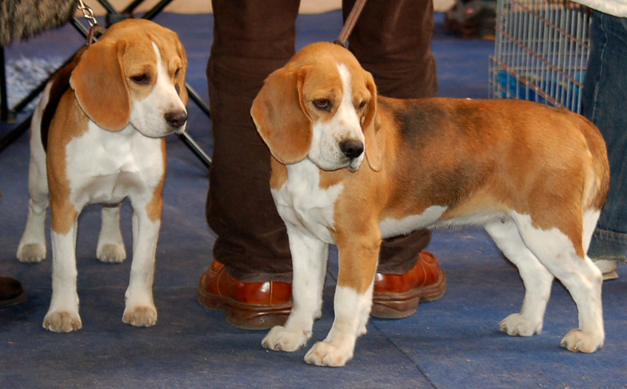 Beagle rasa psów